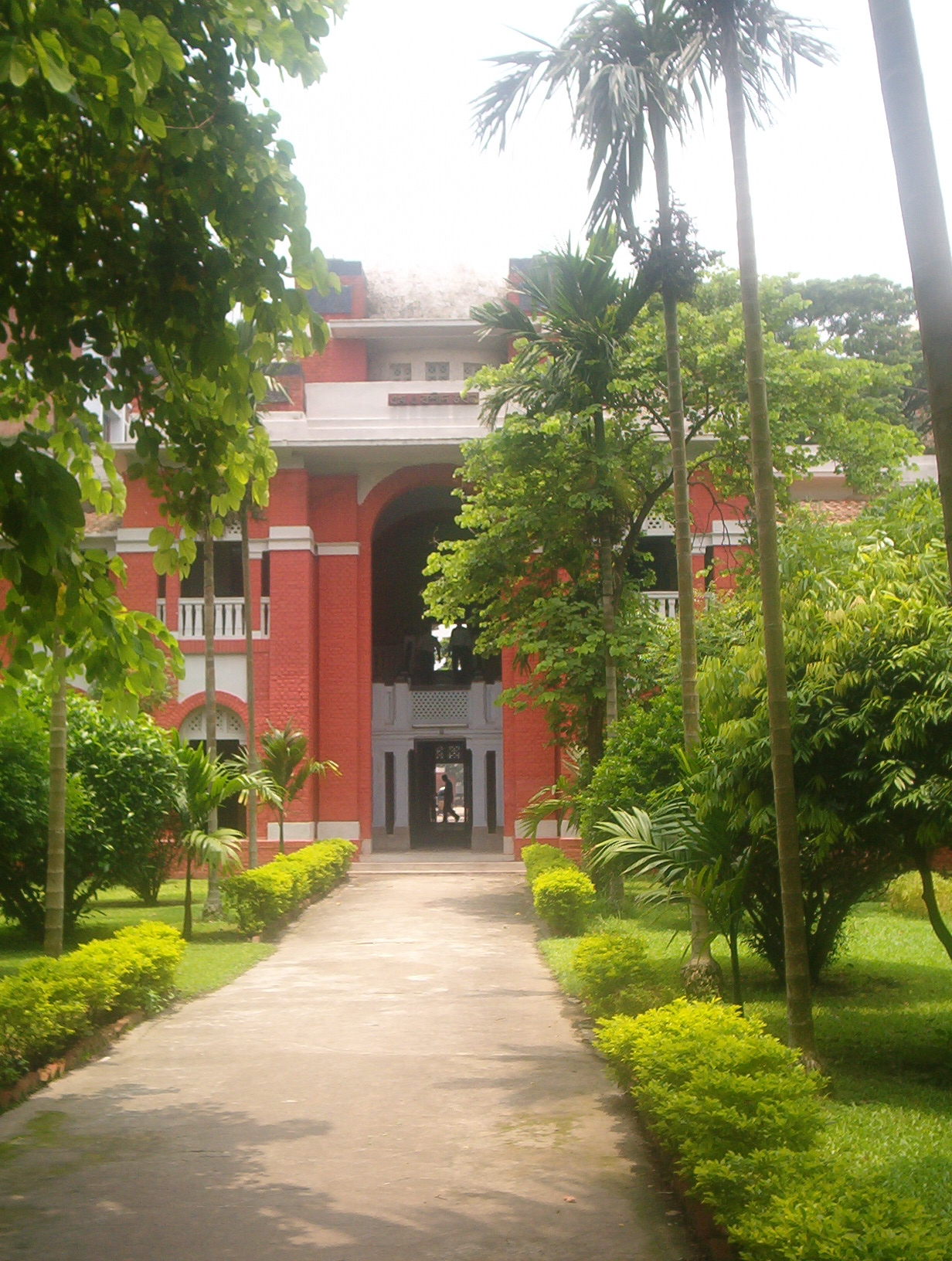 Register Building at BUET